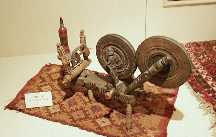 Çıkrık, Ankara Etnoğrafya Müzesi